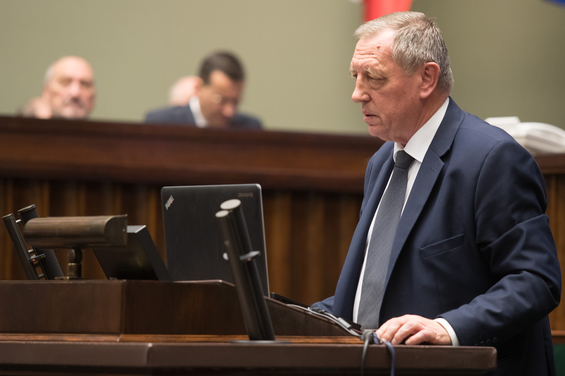 Zmarł prof. Jan Szyszko, były minister środowiska i wieloletni poseł.